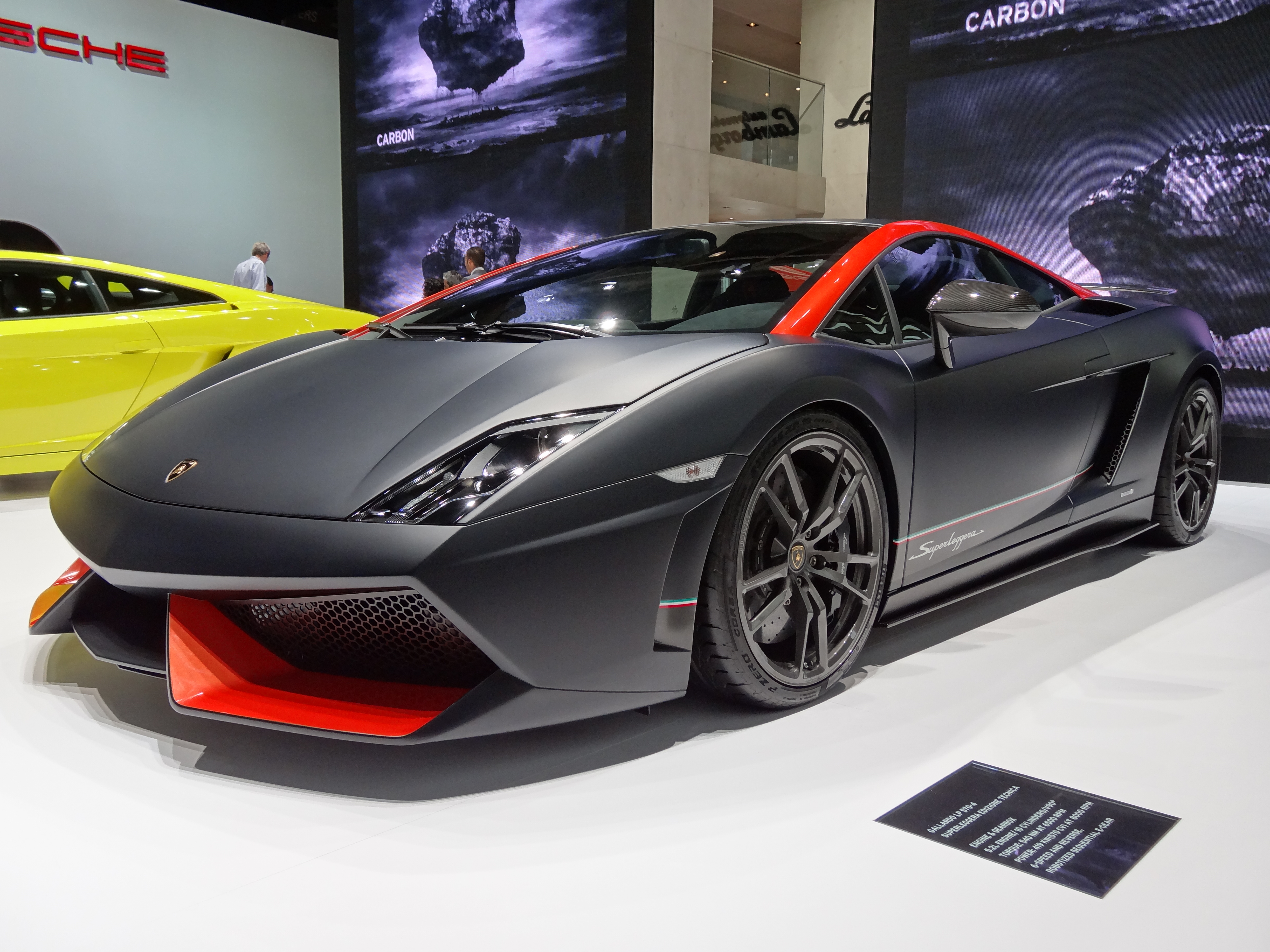 LP 570-4 Superleggera Edizione Tecnica 570 PS 540 N.m 325 km/h 0-100 km/h 3.4 s